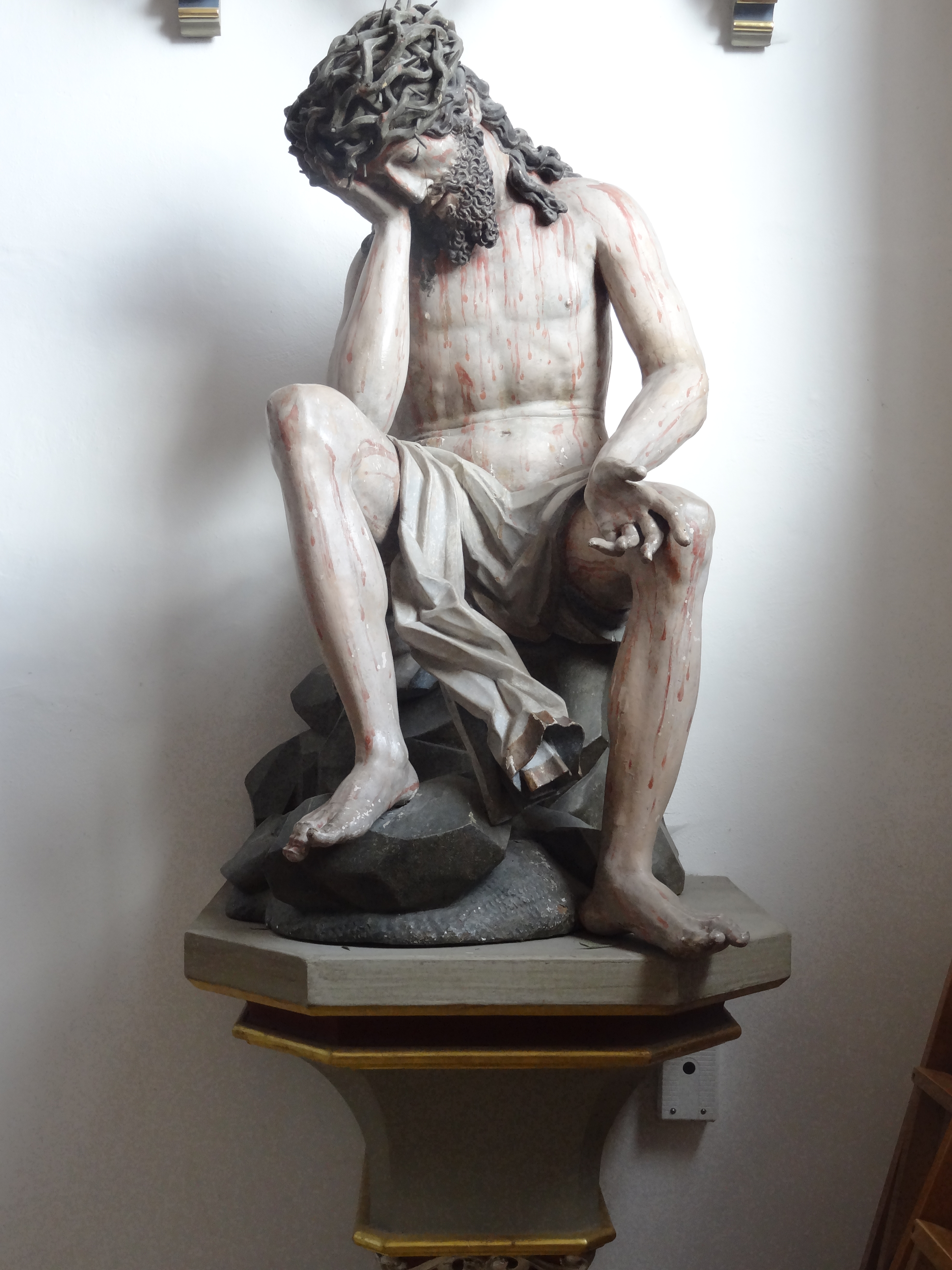 Spätgotische Holzplastik Christus in der Rast in der Stadtpfarrkirche Mariä Himmelfahrt in Vilsbiburg